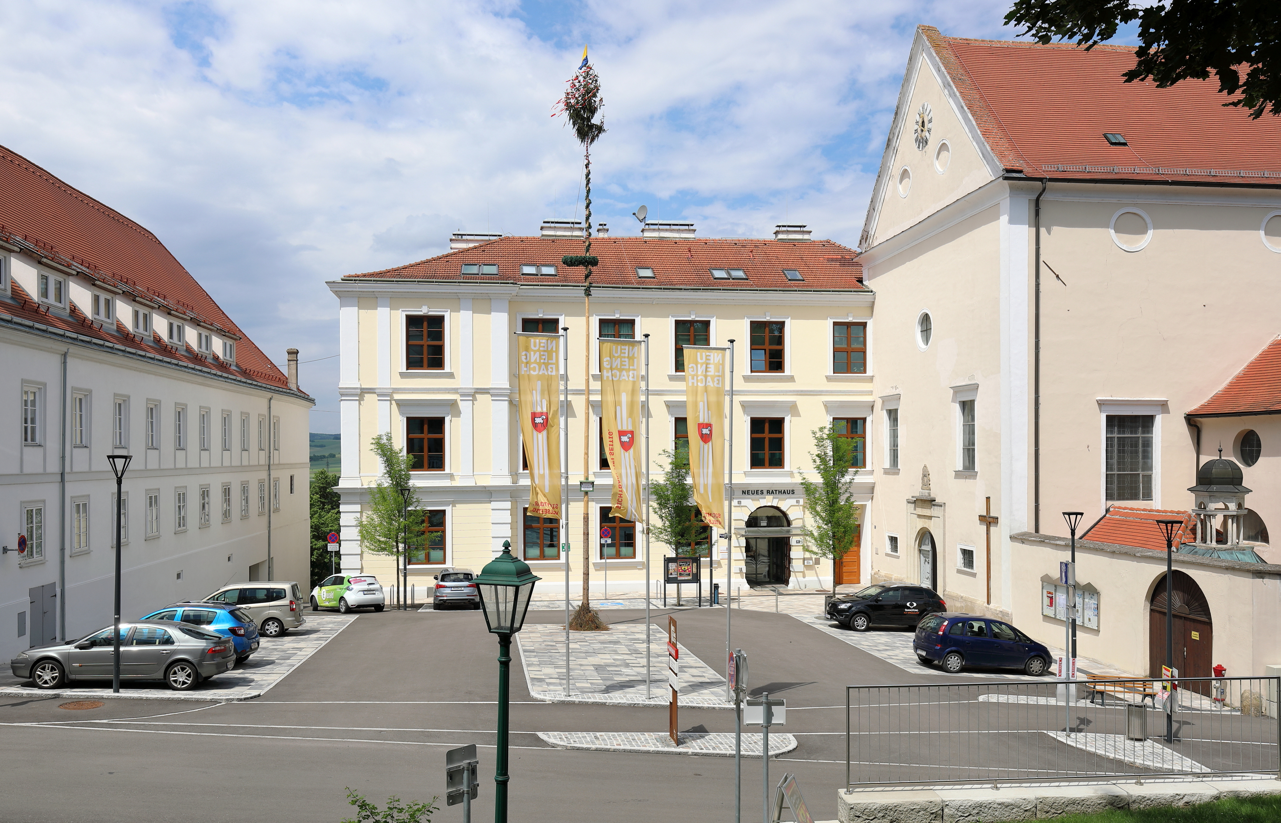 Der Kirchenplatz der niederösterreichischen Stadtgemeinde Neulengbach. Links das Bezirksgericht, in der Bildmitte das Rathaus und rechts die Pfarrkirche.